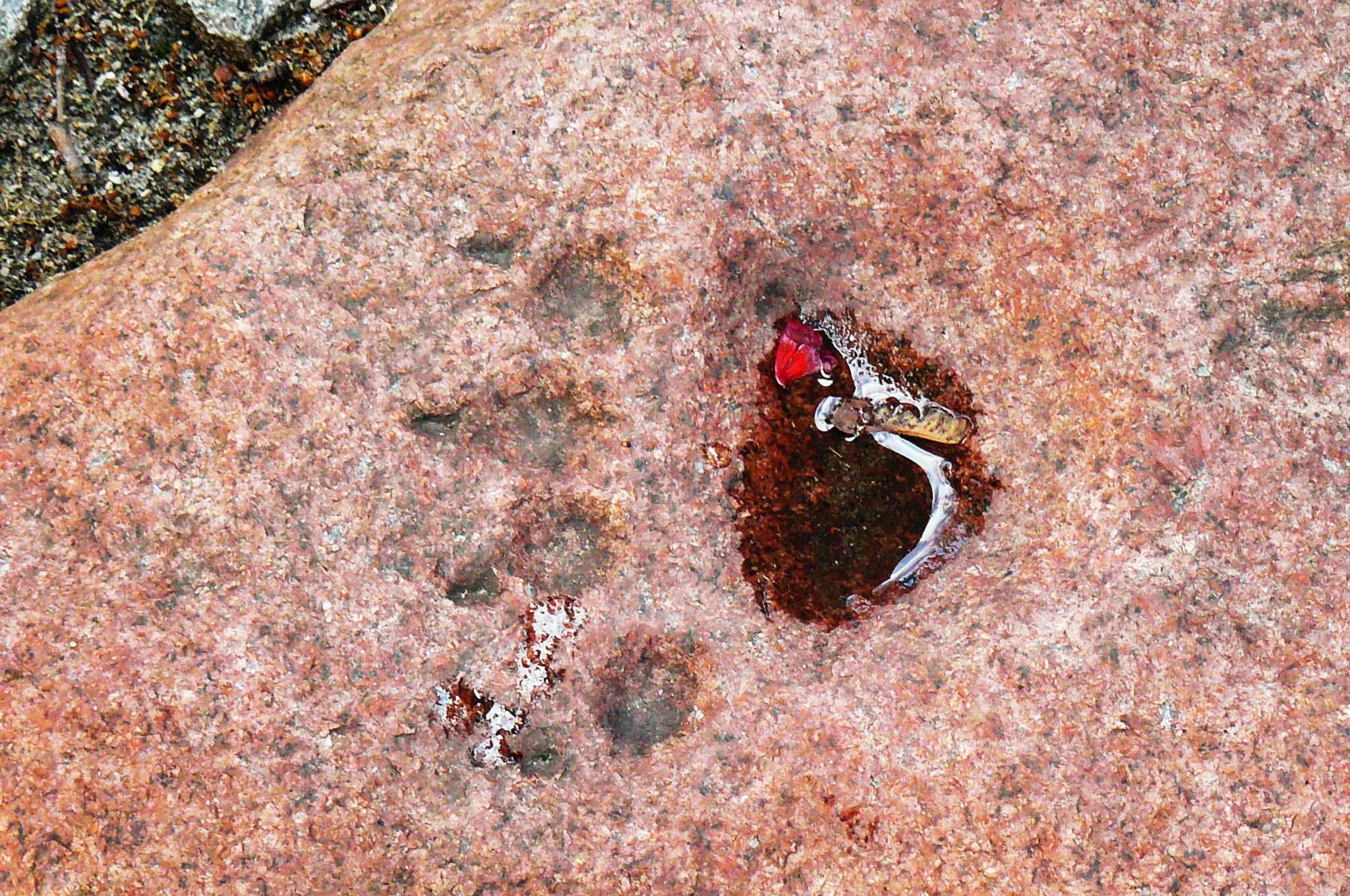 Figura Misia Maciusia w Gniewie przy ul. Sambora.